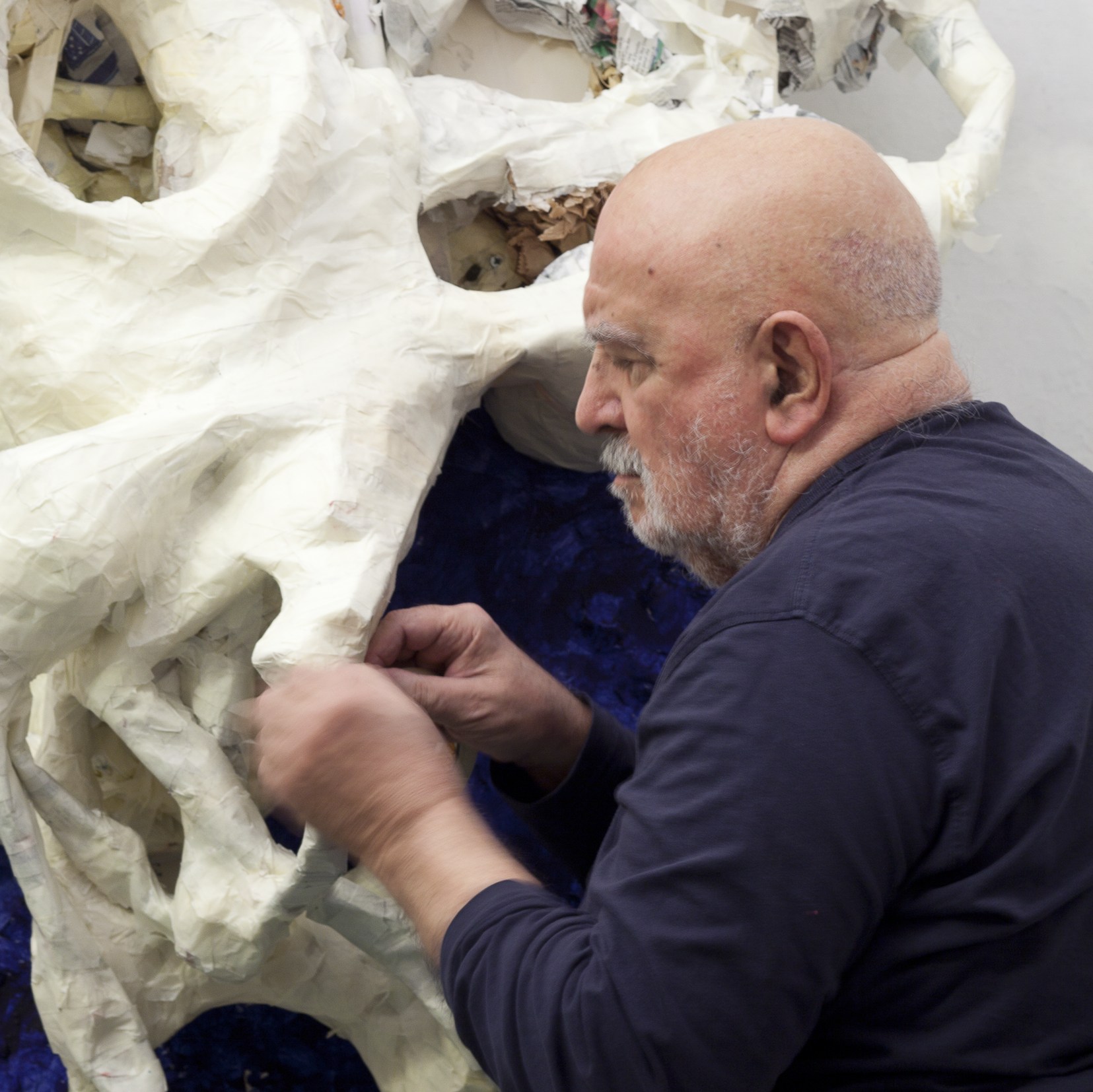 Plinio Mesciulam al lavoro